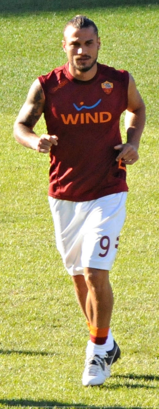 Pablo Daniel Osvaldo s'échauffant avant le match amical opposant l'AS Rome au Liverpool FC